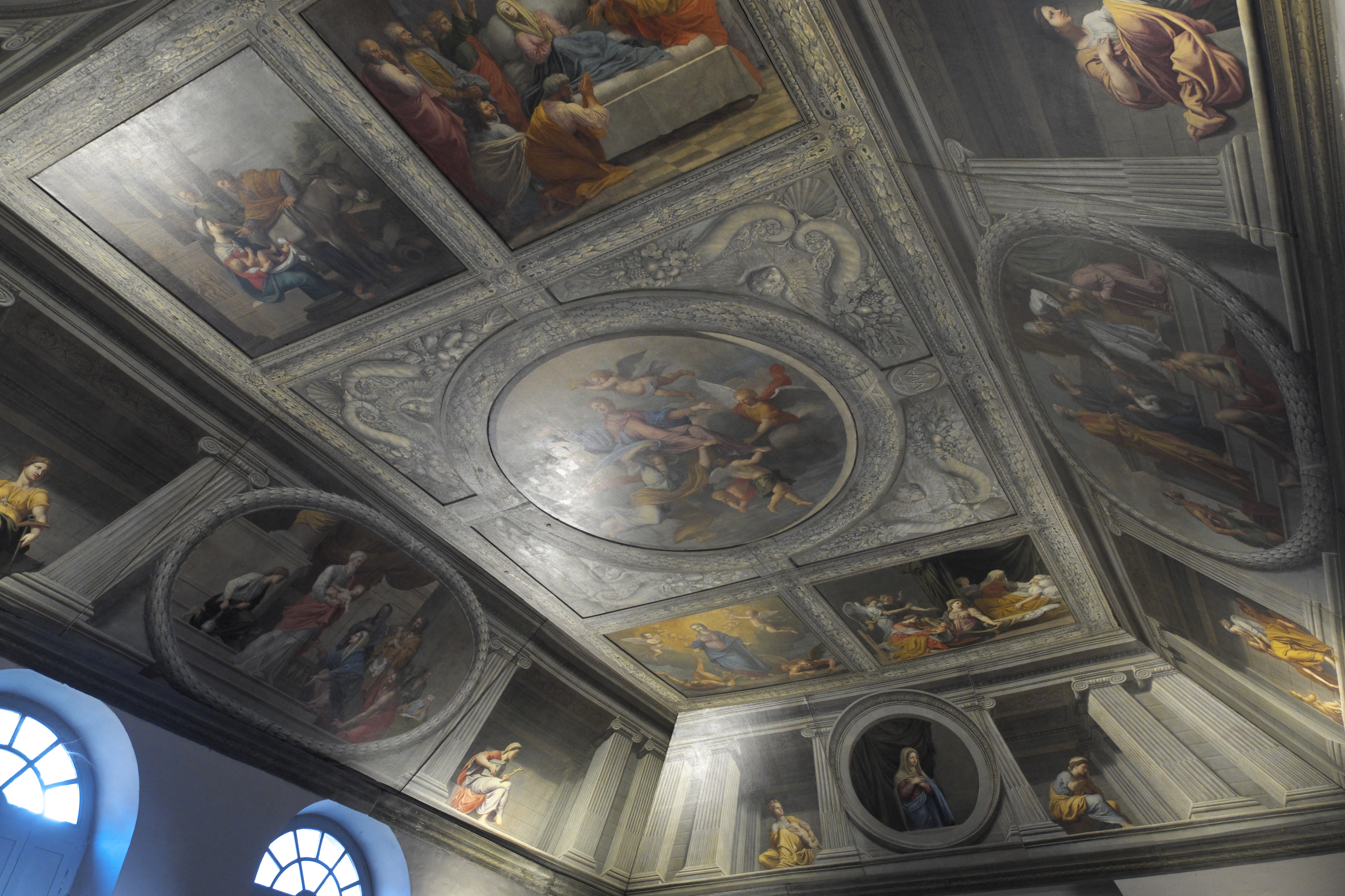 Kapelle Saint-Joseph, ehemalige Kapelle des Ordens von der Heimsuchung Mariens (Chapelle de la Visitation) in Moulins im Département Allier (Auvergne-Rhône-Alpes/Frankreich), Deckenmalerei aus dem 17. Jahrhundert, Rémy Vuibert zugeschrieben; Darstellung: Szenen aus dem Marienleben, Tugenden